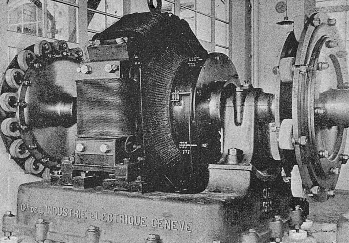 130 kw Dynamo System Thury von der elektrische Kraftübertragung der Papierfabrik Biberist. Eventuell handelte es sich auch um eine als Motor genutzte Maschine. Es sind deutlich die isolierten Kupplungen auf beiden Seite der Maschine zu sehen